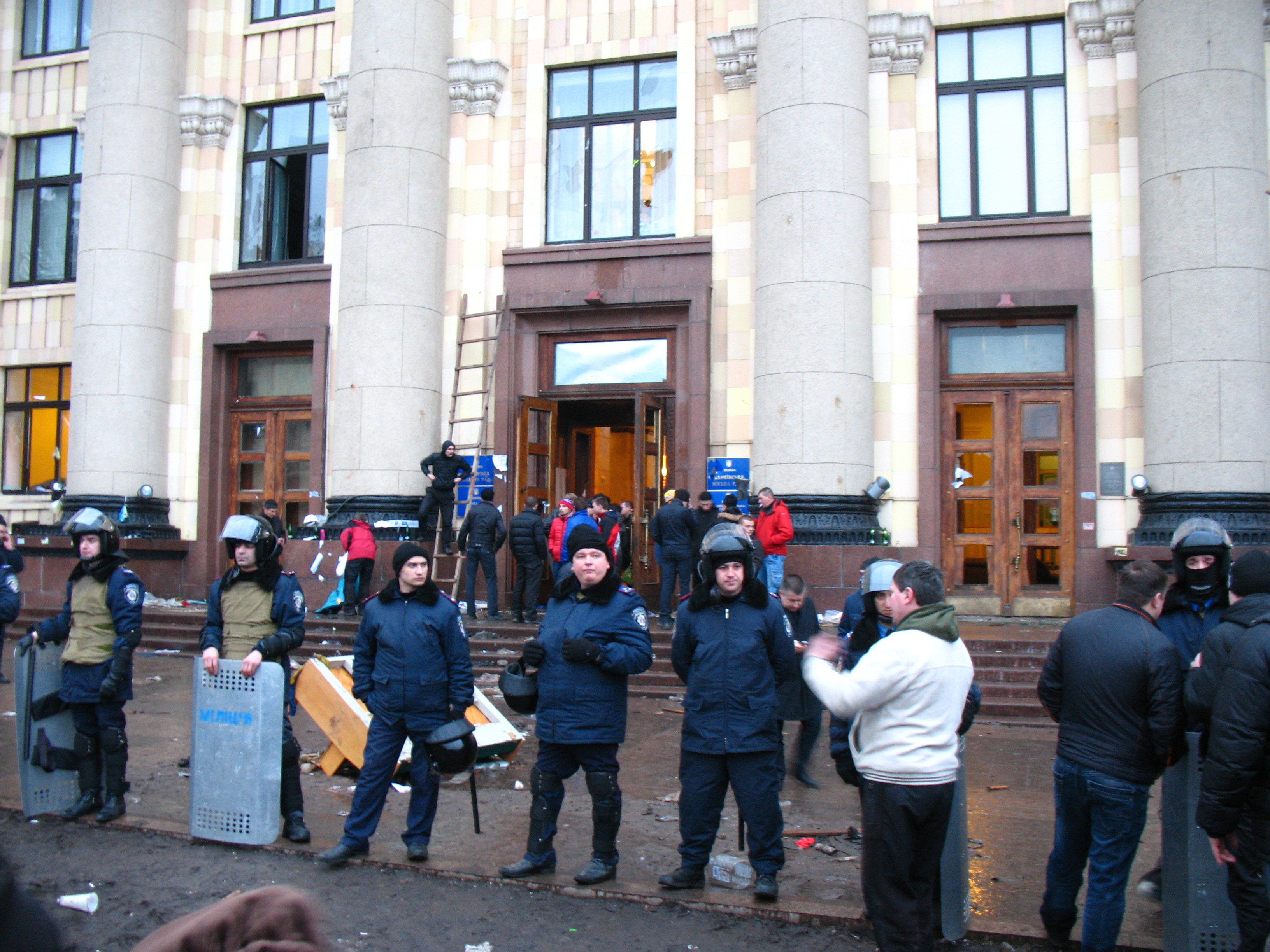 Харьков, 1 марта, вечер. Здание Харьковской областной администрации.([1]).